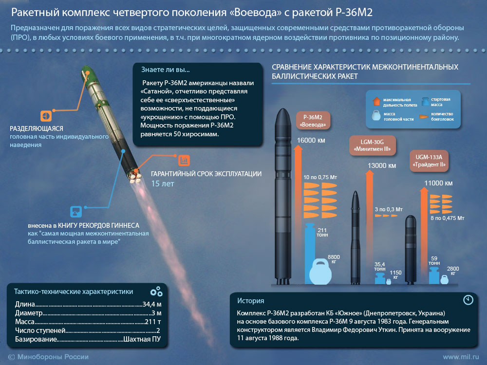 Ракетный комплекс четвертого поколения «Воевода» с ракетой Р-36М2